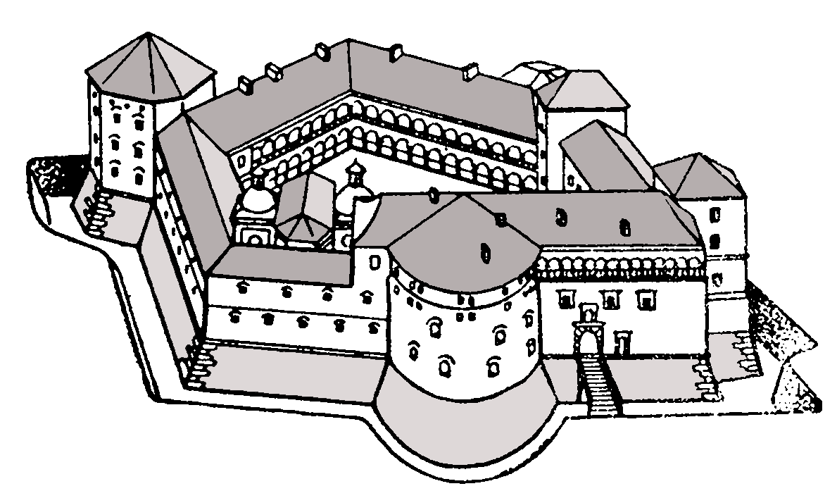 Skizze der Burg Bereschany, Bearbeitung auf Grundlage einer Zeichnung von H. Lohwyna, frei unter GNU FDL